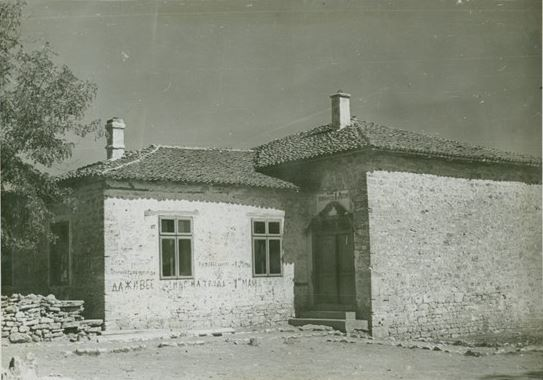 Народно начално училище „Петър Берон“ в село Видно, Добричко.